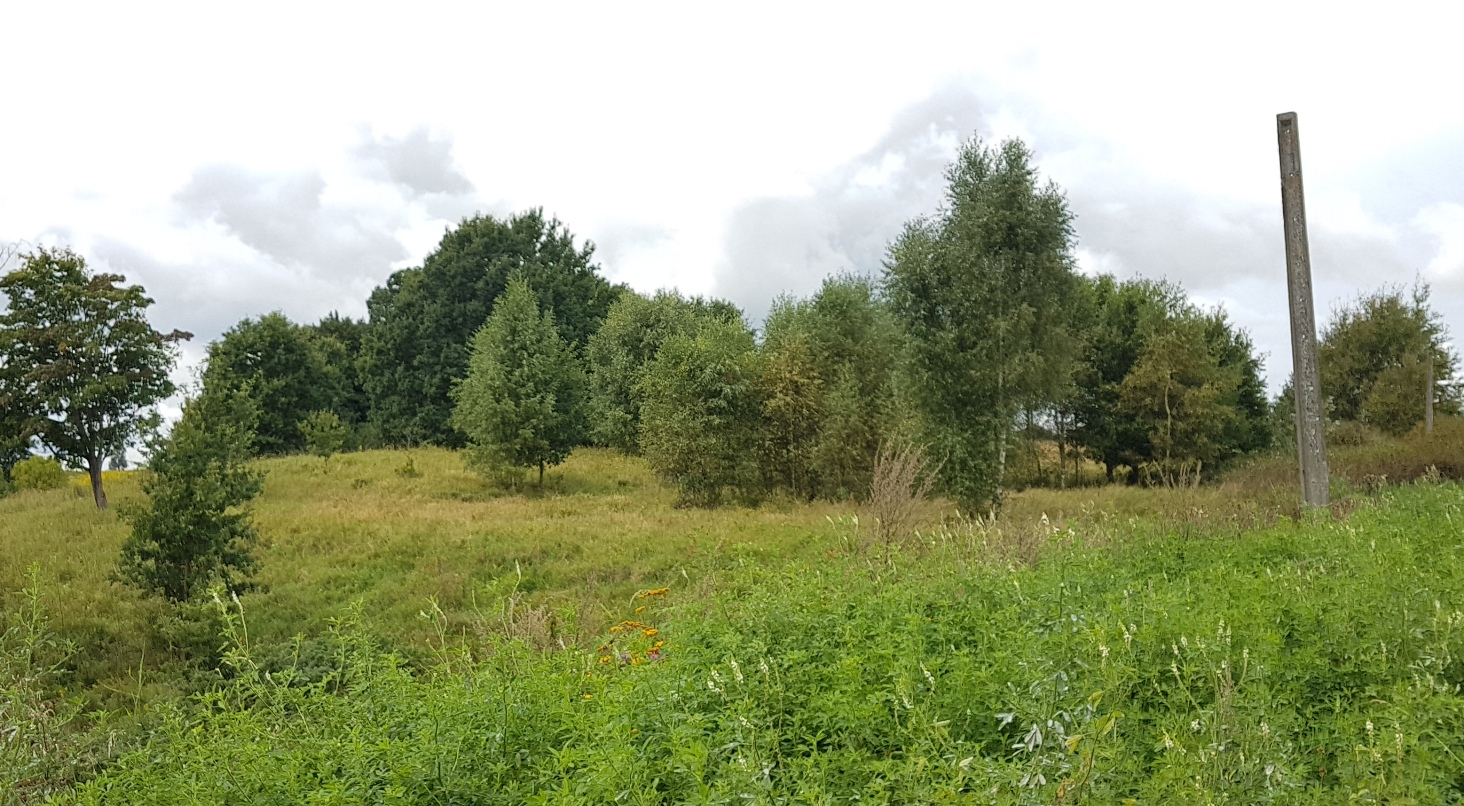 W tle drzewa okalające były Cmentarz Żydowski